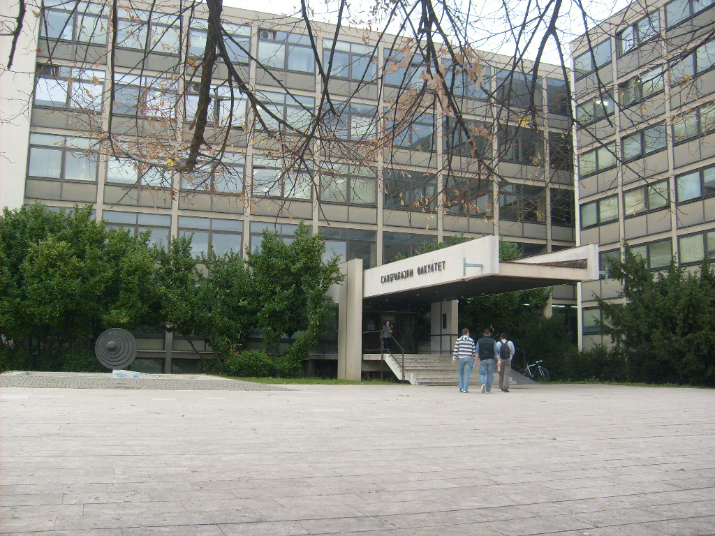 Саобраћајни факултет Универзитета у Београду.